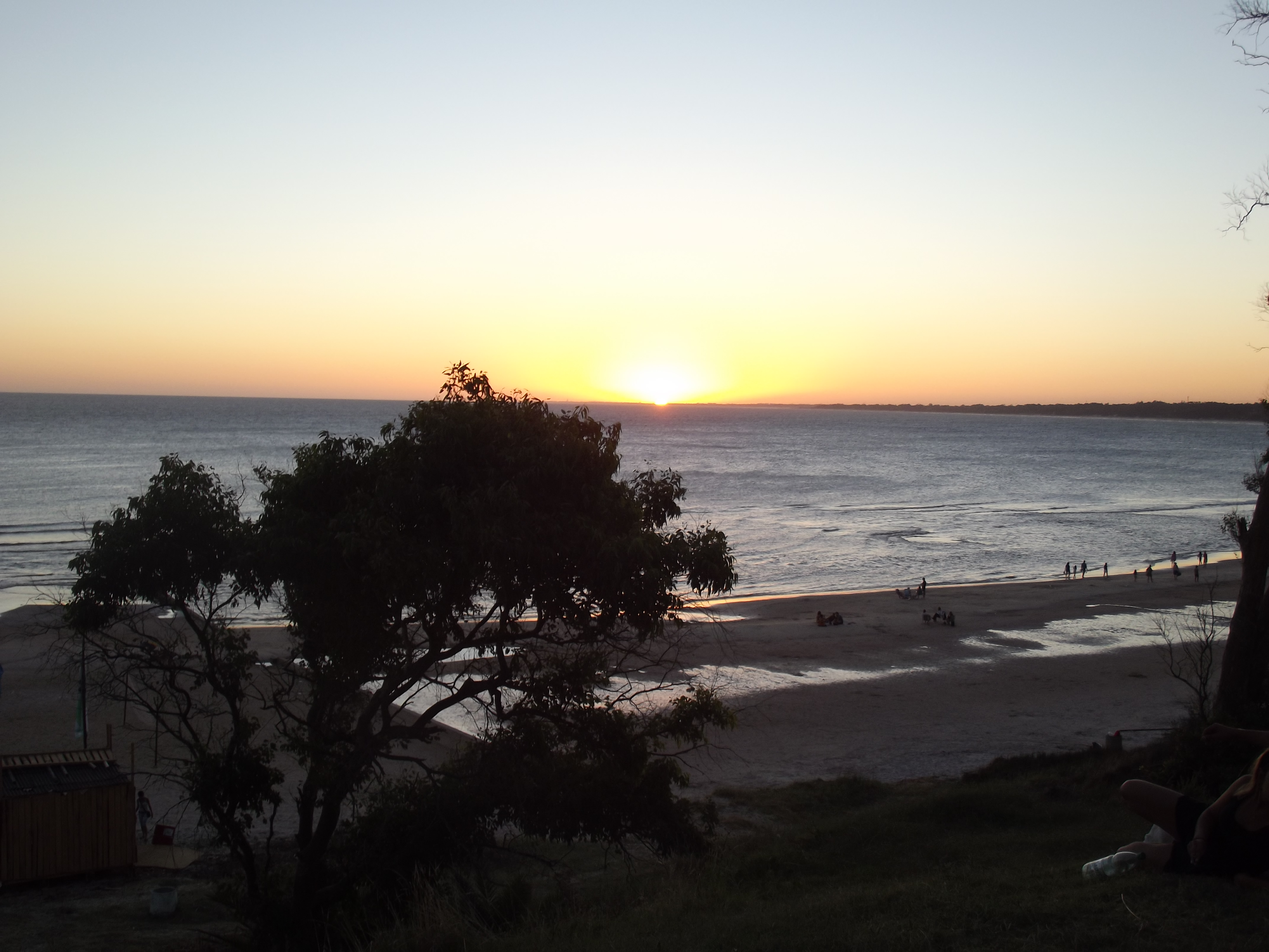 Playa de Atlántida, Canelones